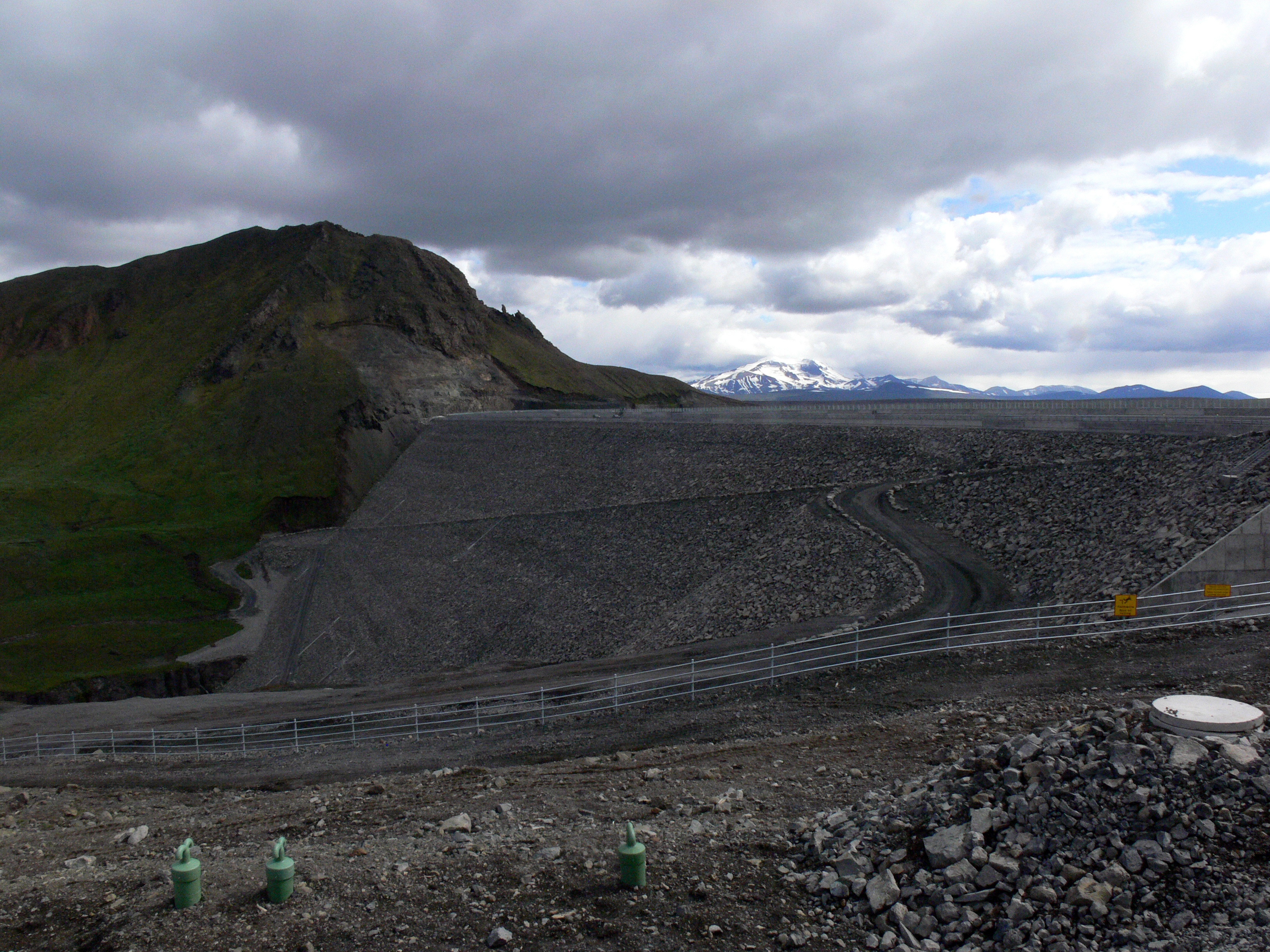 Der Staudamm.